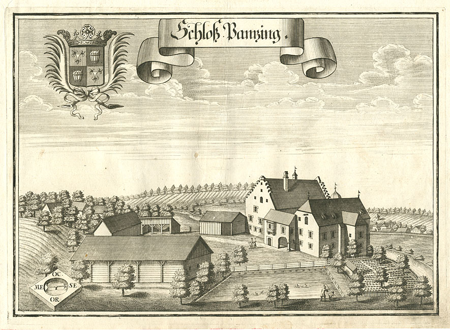 "Schloß Panzing" (Panzing), aus: Beschreibung des Churfürsten- u. Hertzogthumbs Ober- und Nidern Bayrn. Rentamt Landshut, 1723